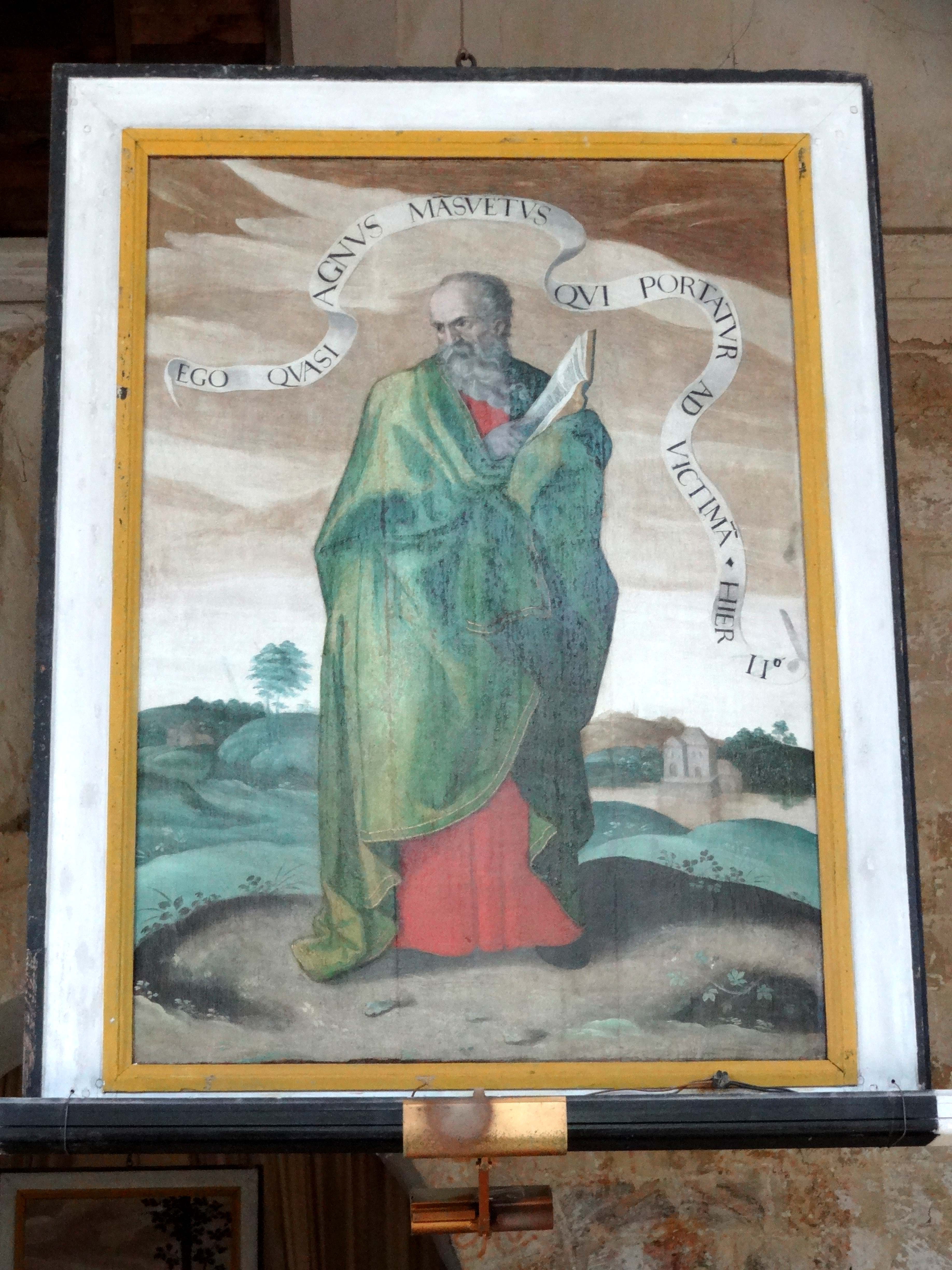 Mobilier de l'église - voir titre.